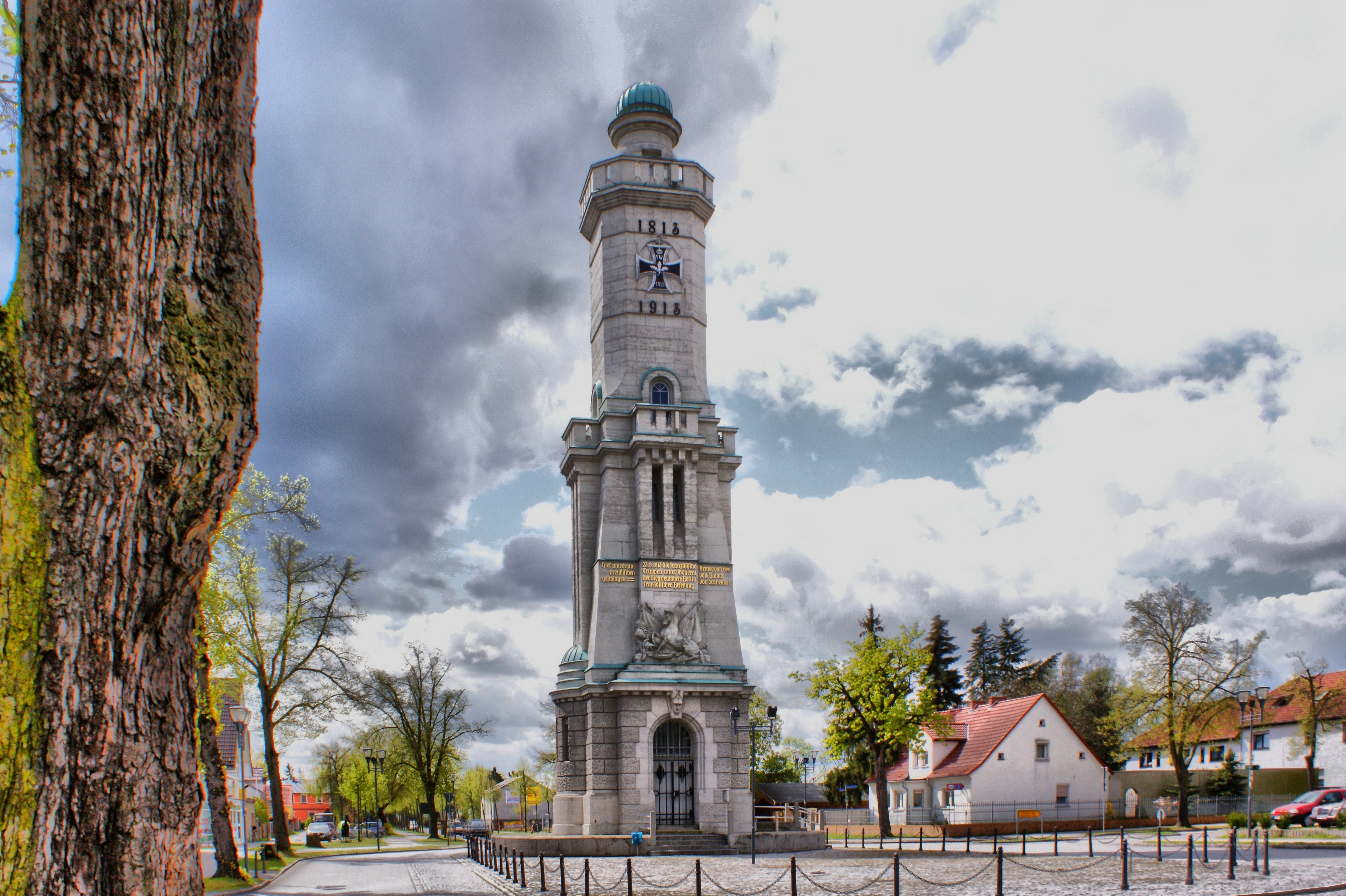 Gedenkturm Großbeeren in HDR